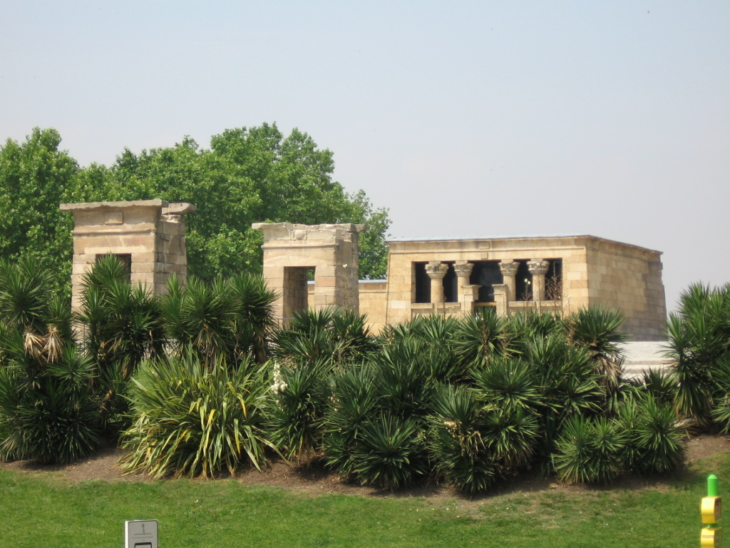 Temple debod,Madrid